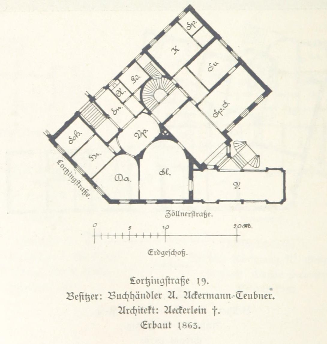 Villa Albin Ackermann-Teubner (Leipzig, Lortzingstraße 19 Ecke Emil-Fuchs-Straße), erbaut 1863 nach Plänen Carl Gustav Aeckerlein (1832–1886). Albin Ackermann-Teubner (1826-1903) war Schwiegersohn des Benedictus Gotthelf Teubner und ab 1853 Inhaber des Leipziger Traditionsverlages B.G. Teubner. In den 1850er Jahren stieß ein weiterer Schwiegersohn B. G. Teubners, Adolf Roßbach, der mit seiner Tochter Julia verheiratet war, als Mitinhaber in den Verlag ein. Nachdem sich Albin Ackermann-Teubner bereits 1862 auf dem Eckgrundstück Lortzingstraße 19 Ecke Emil-Fuchs-Straße (damals Zöllnerstraße) eine Villa hatte erbauen lassen, folgte 1870 auf der gegenüber liegenden Straßenseite der Lortzingstraße 16, ebenfalls Ecke Emil-Fuchs-Straße, der Neubau der Villa Adolf Roßbach.